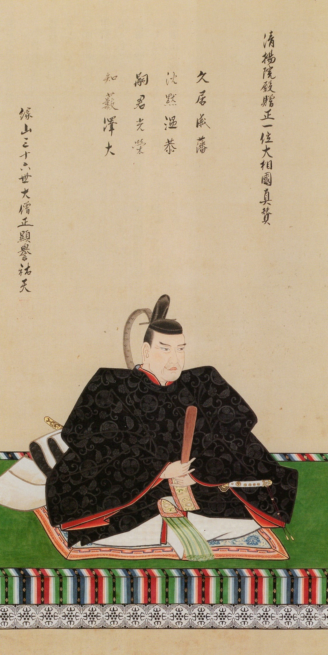 甲斐甲府藩主・徳川綱重の肖像画。